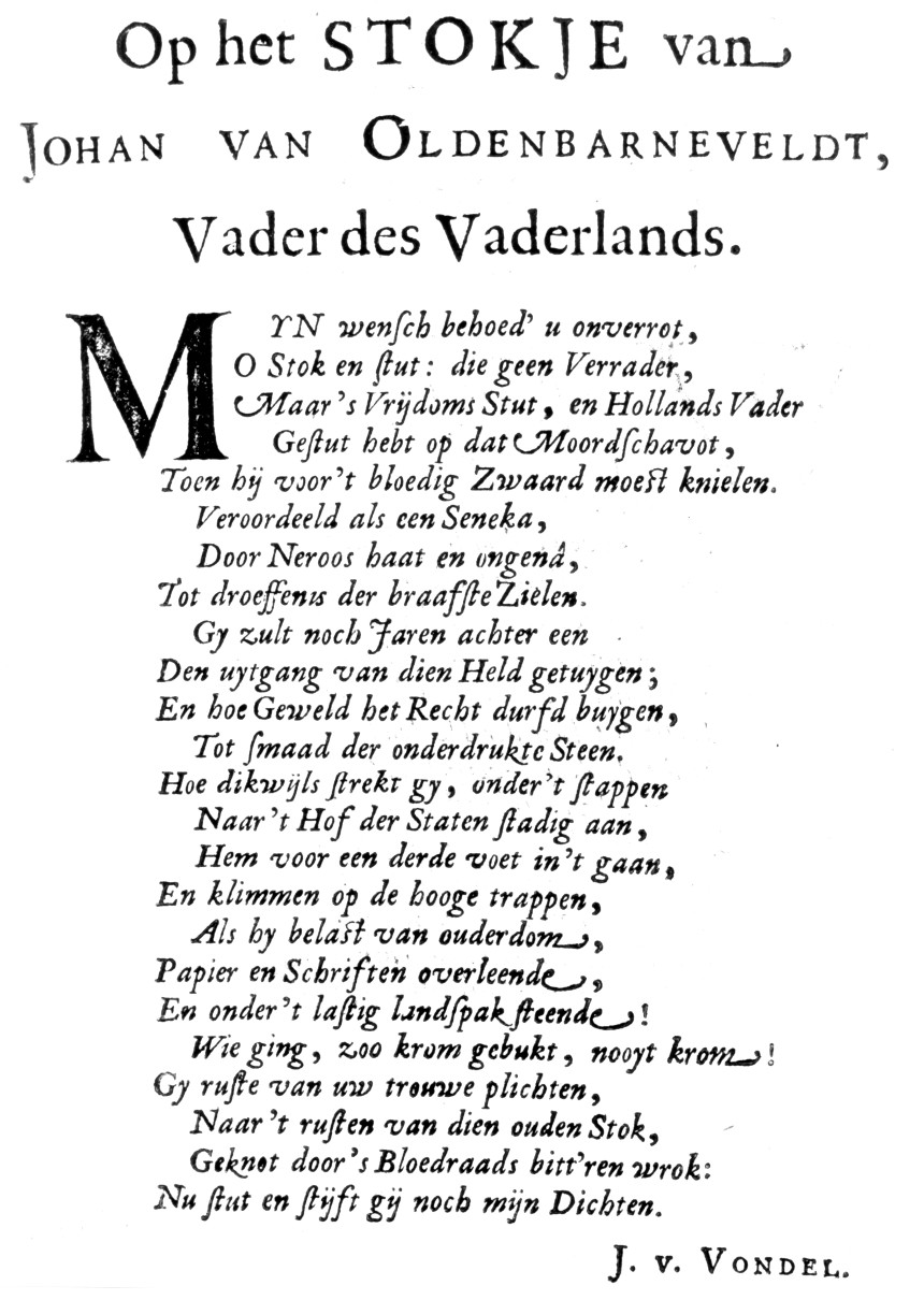 Het stockske van Joan van Oldenbarnevelt (1657), door Joost van den Vondel.